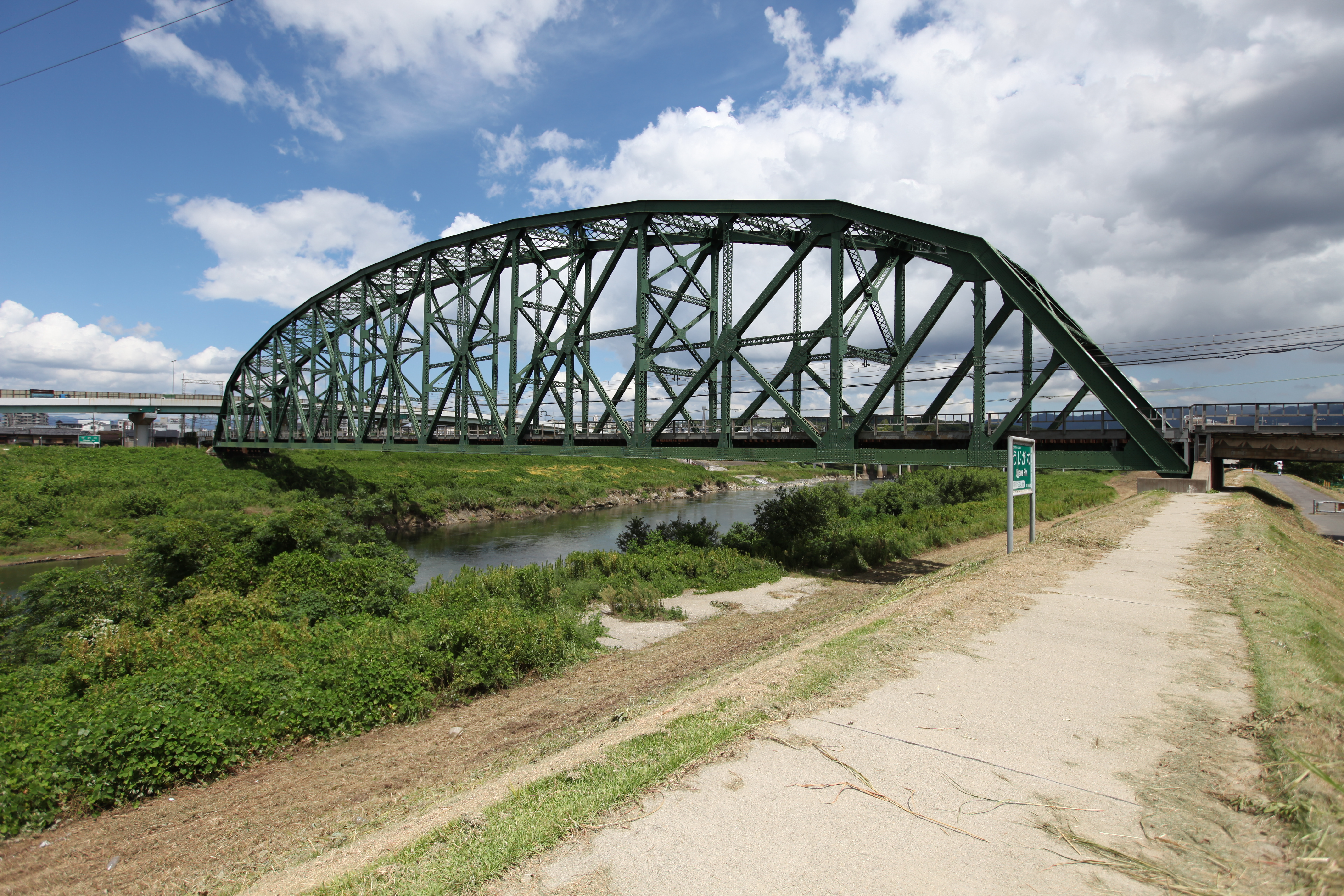 近鉄京都線、澱川橋梁。左岸下流側より撮影。